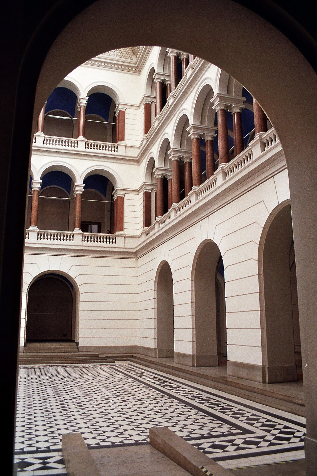 Technische Universität Berlin, interior hall